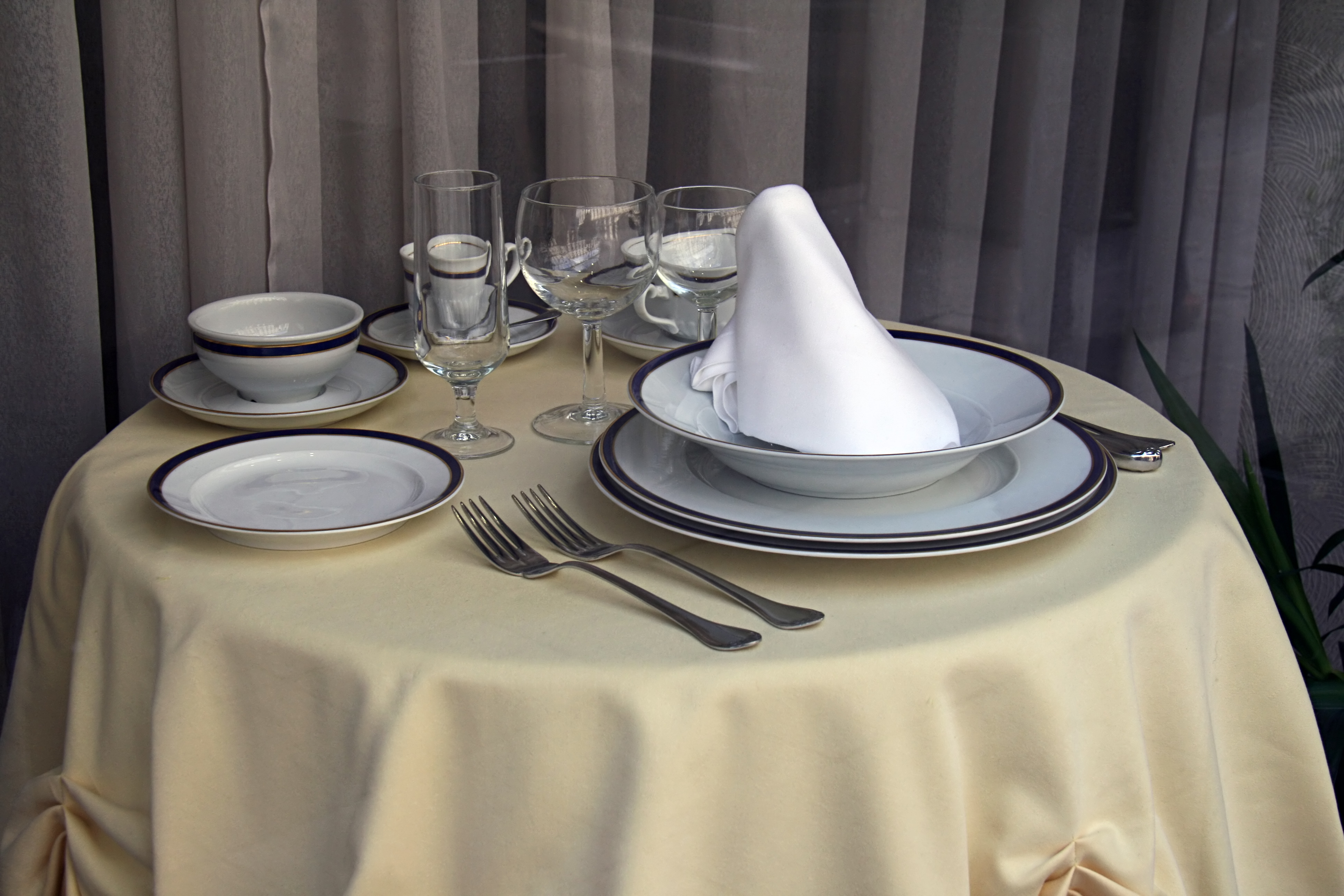 Ordenación de una mesa